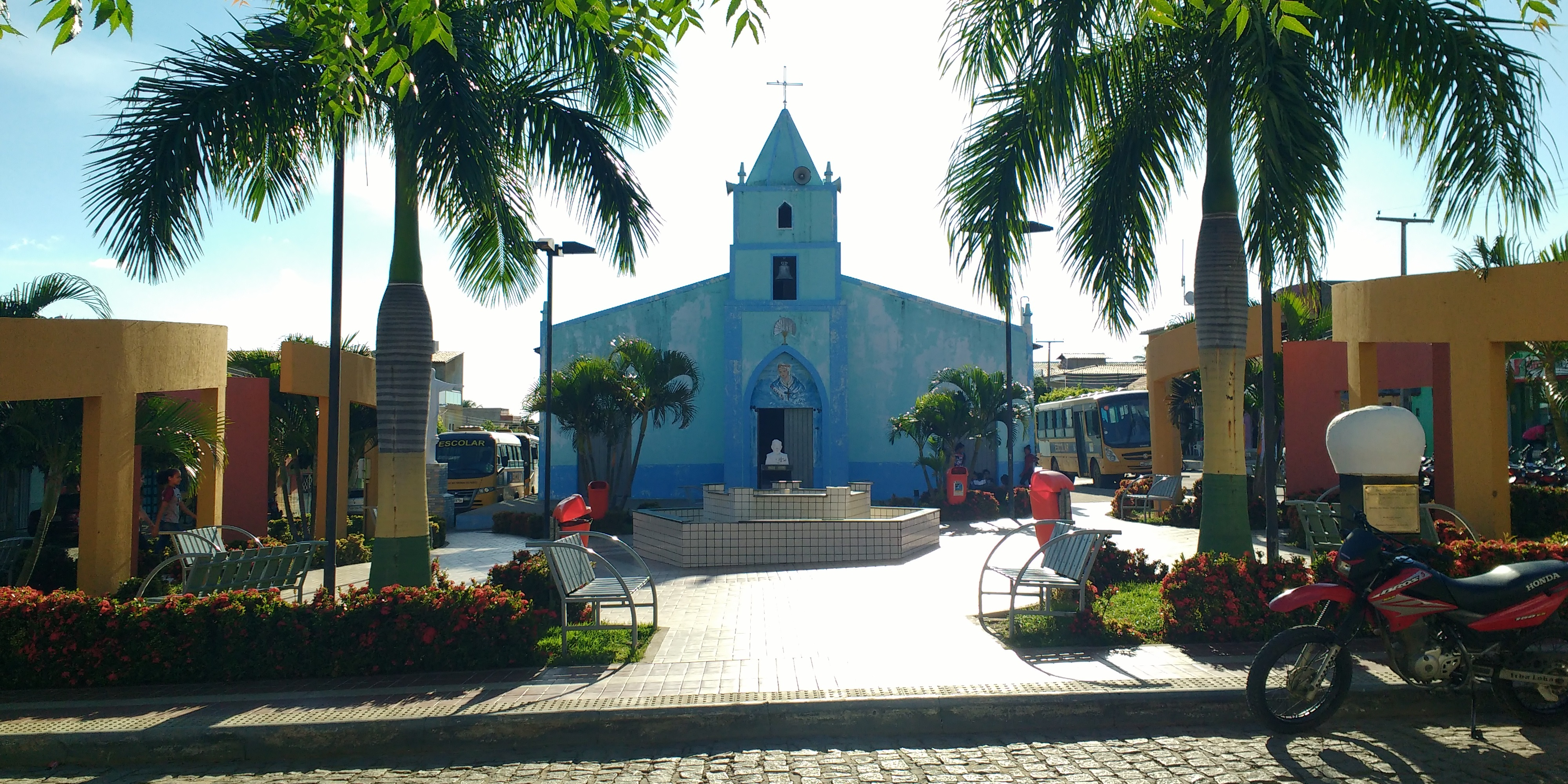 Praça Valentin Guinter, em Serrinha dos Pintos, Rio Grande do Norte (Brasil). Ao fundo a Capela Nossa Senhora da Salete, padroeira do município.